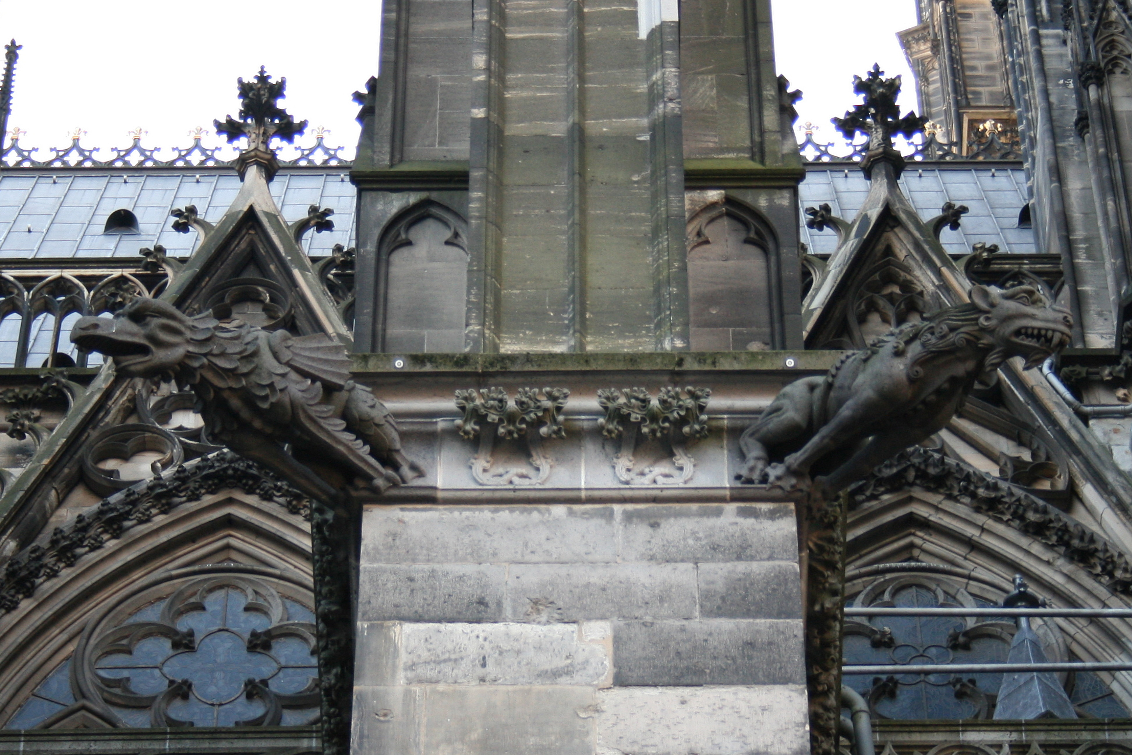 Gargoyles am Kölner Dom, Nordseite